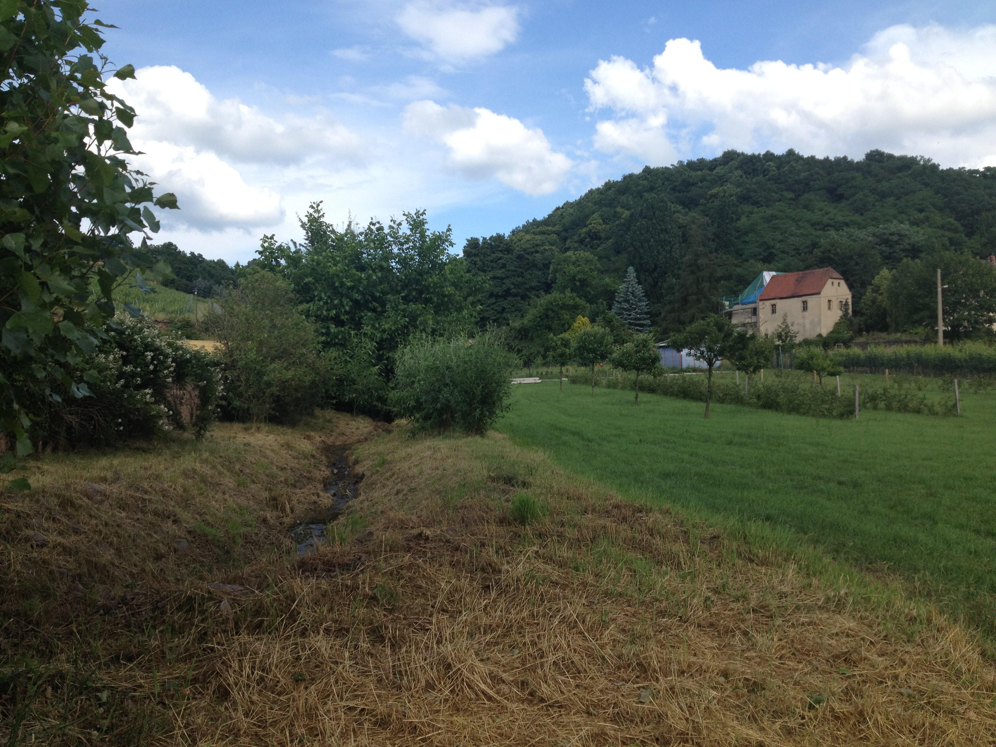 Radebeul Rietzschke, rechts im Hintergrund Haus Baurick